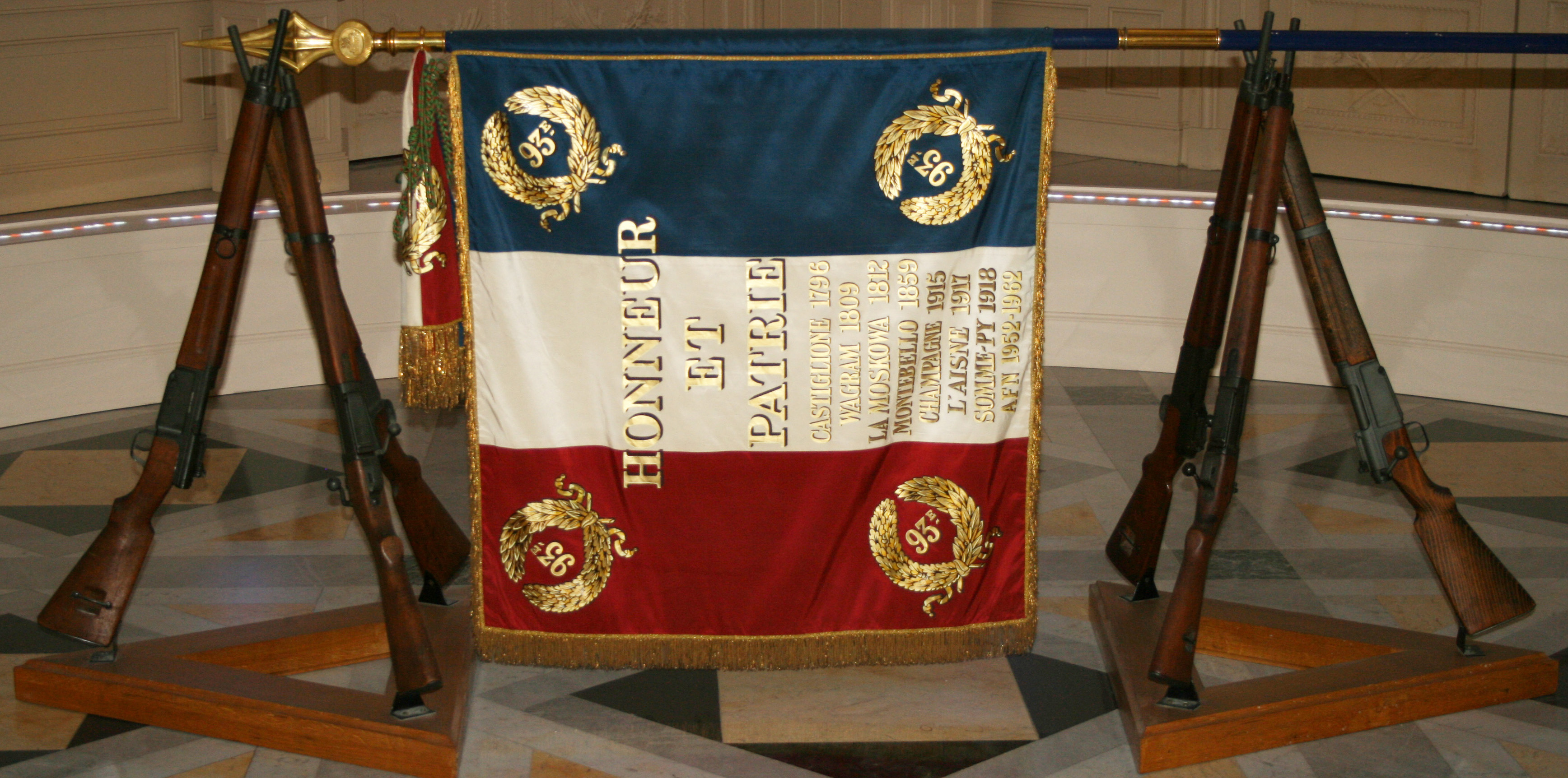 Collection photographique de l'Amicale des anciens du 93ème RI